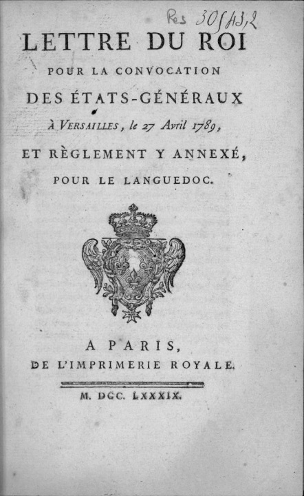 Lettre du Roi pour la convocation des États généraux À Versailles, le 27 avril 1789 Et règlement y annexé, Pour le Languedoc. À Paris, de l'Imprimerie royale. M. DCC. LXXXIX.